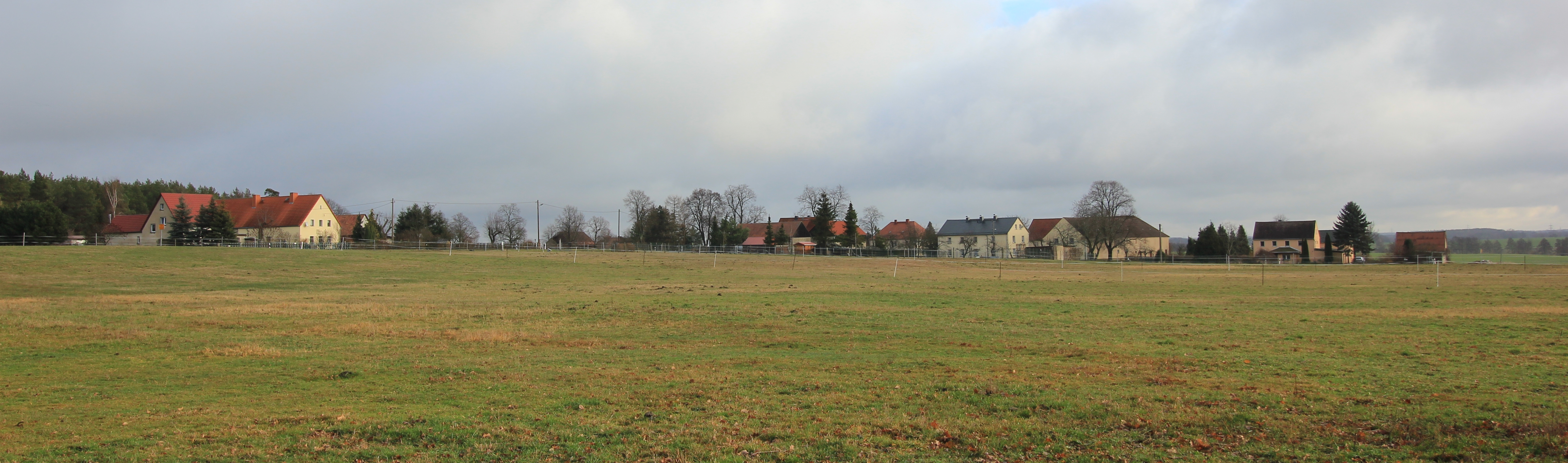 Hornjoserbsce: Napohlad Łomska pola Njeswačidła z juhozapada.